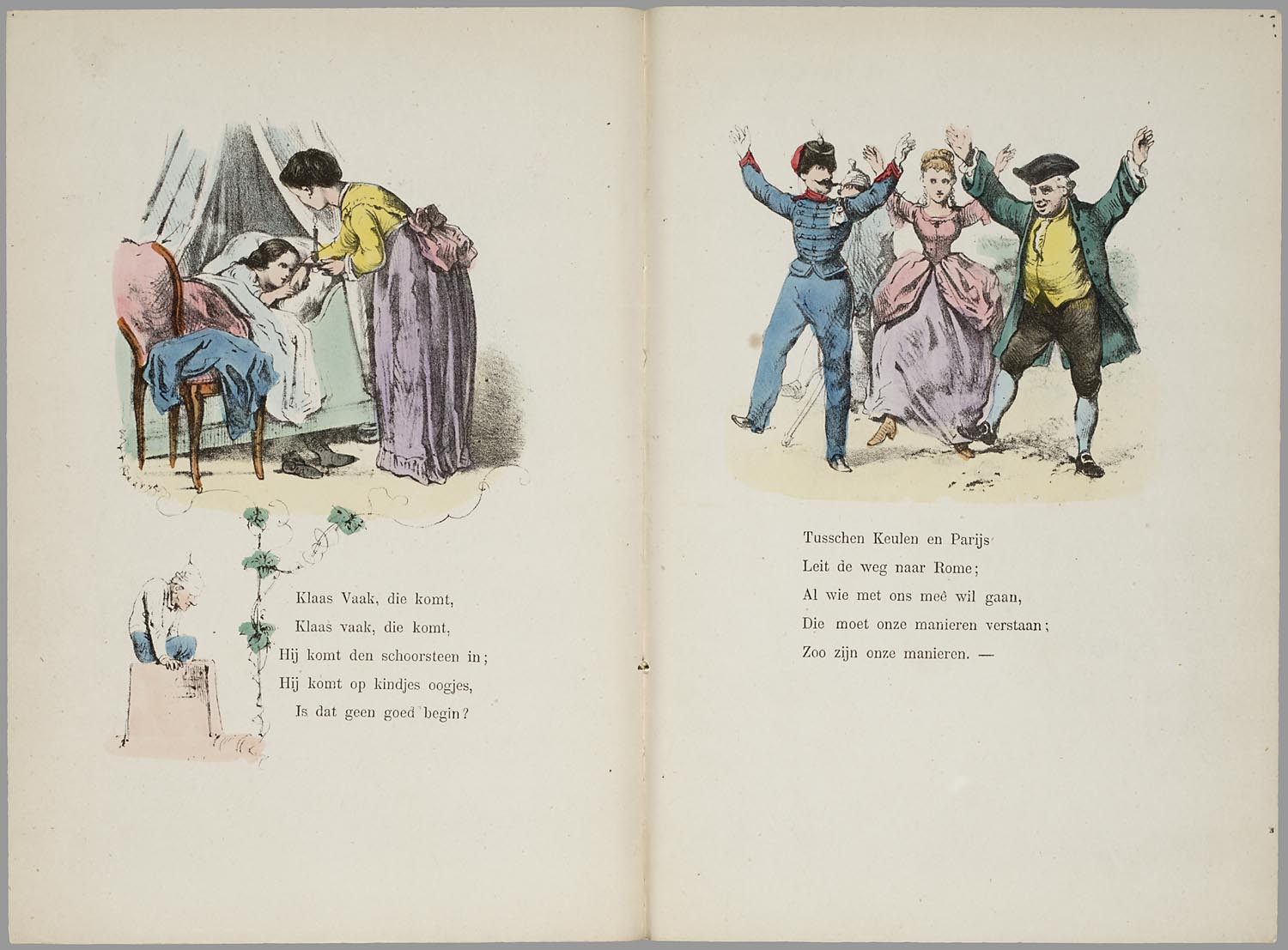 Prentenboek met 8 bladen waarop een handgekleurde litho staat met daaronder een bakerrijm met 4 tot 8 regels. De versjes zijn: Suja, suja, kindje; Draai het wieltje nog 'er eens om; Jufvrouw wil je je jongentje verbieden; Wel, wat zeg je van mijn kippen; Goeden avond, tante Betje; Sinterklaas, goed heilig man; Klaas Vaak, die komt; Tusschen Keulen en Parijs. Zie ook: Lust en Leering, p. 171. 8 bl : handgekl. lith // Omslagtitel // De keerzijde der bladen is onbedrukt // Ingekleurd : f 0,75 Bakerrijmen // Prentenboeken